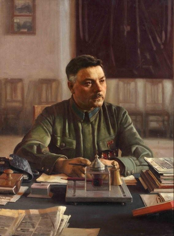 Исаак Бродский - Портрет Климента Ворошилова в кабинете - 1929. Из собрания Института русского реалистического искусства